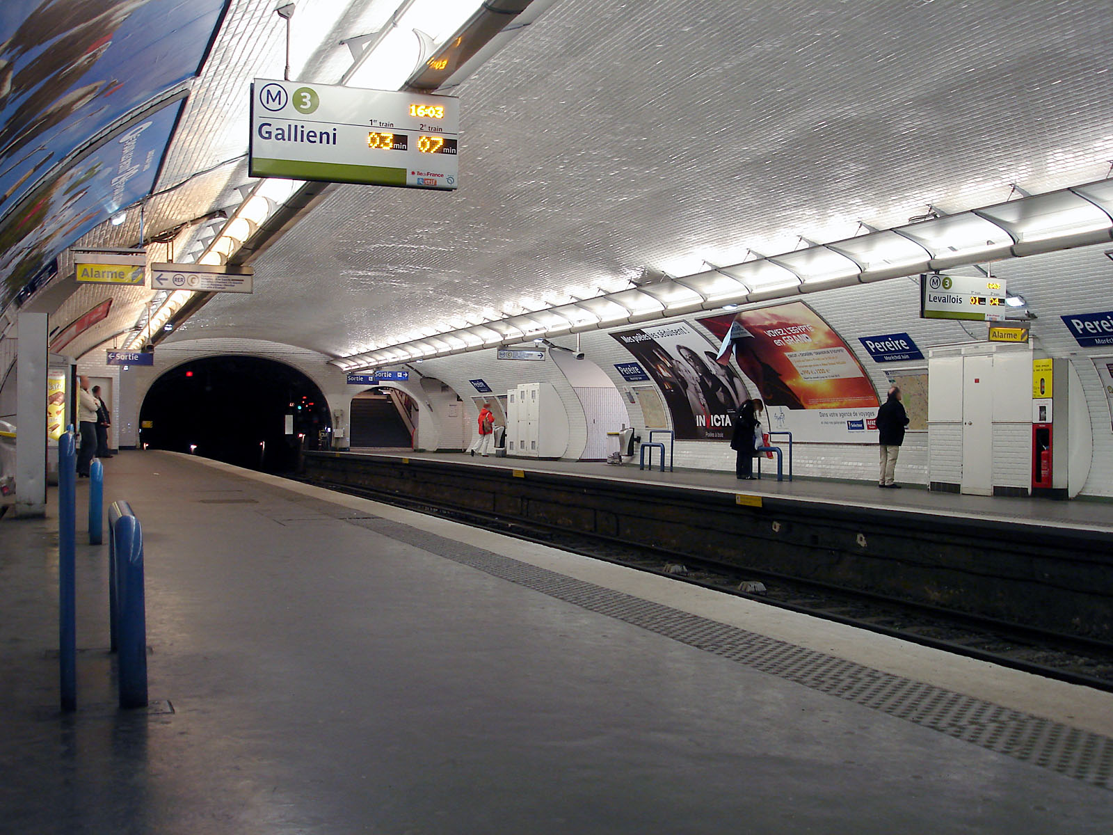 La station Pereire de la ligne 3 du métro de Paris, France.